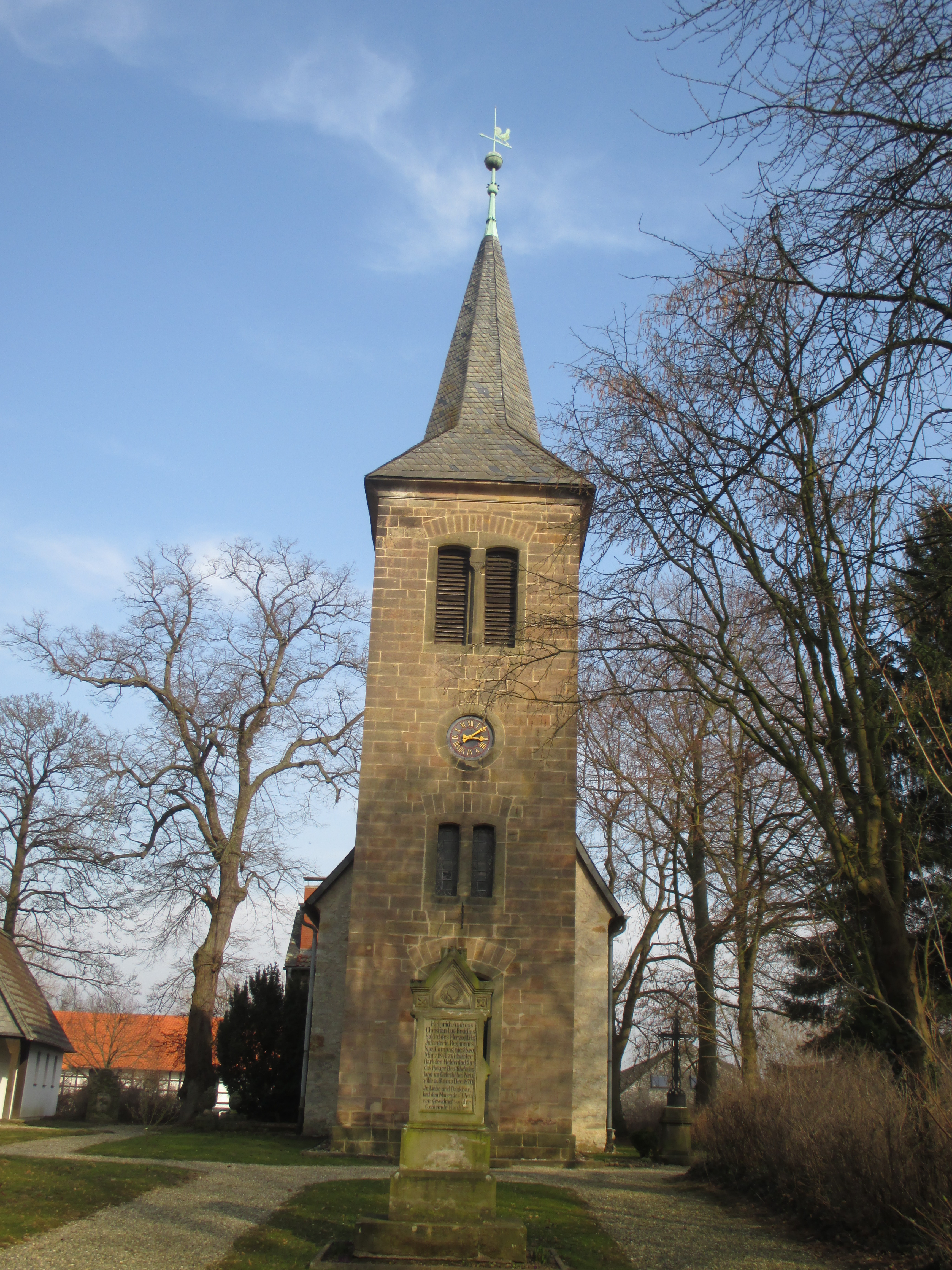 Evangelische Kirche in Halchter, Stadt Wolfenbüttel